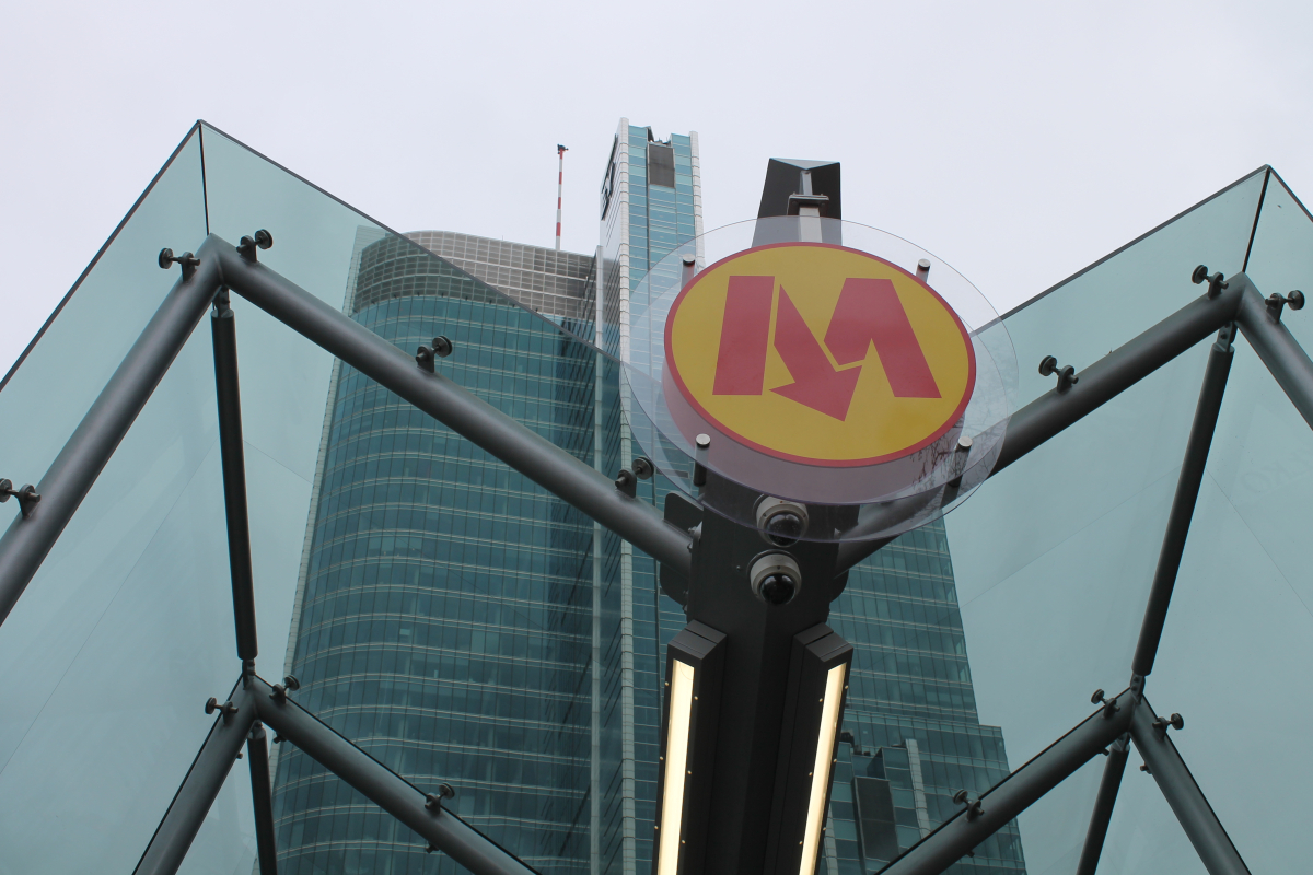 Logo metra zamontowane na wejściu na stację C10 Rondo ONZ na tle biurowca Rondo 1.